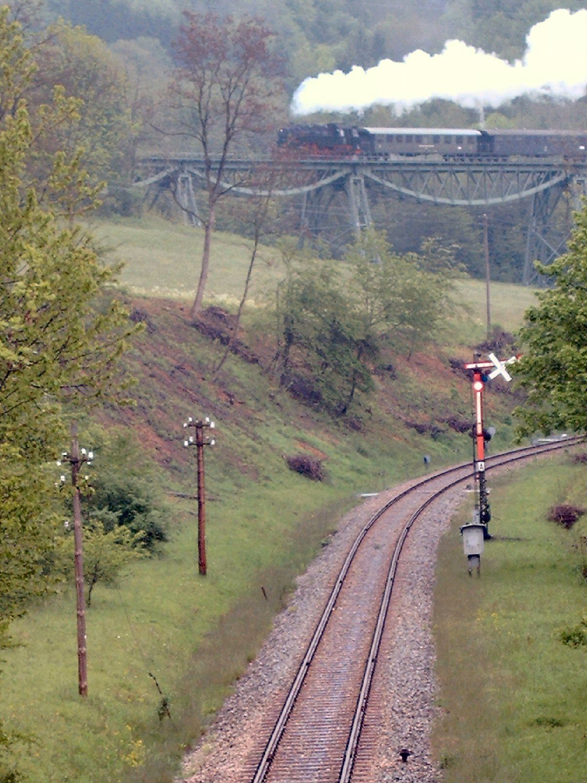 Wutachtalbahn: Zug auf dem Biesenbachviadukt, im Vordergrund die Bahnstrecke kurz vor der Einfahrt Epfenhofen.